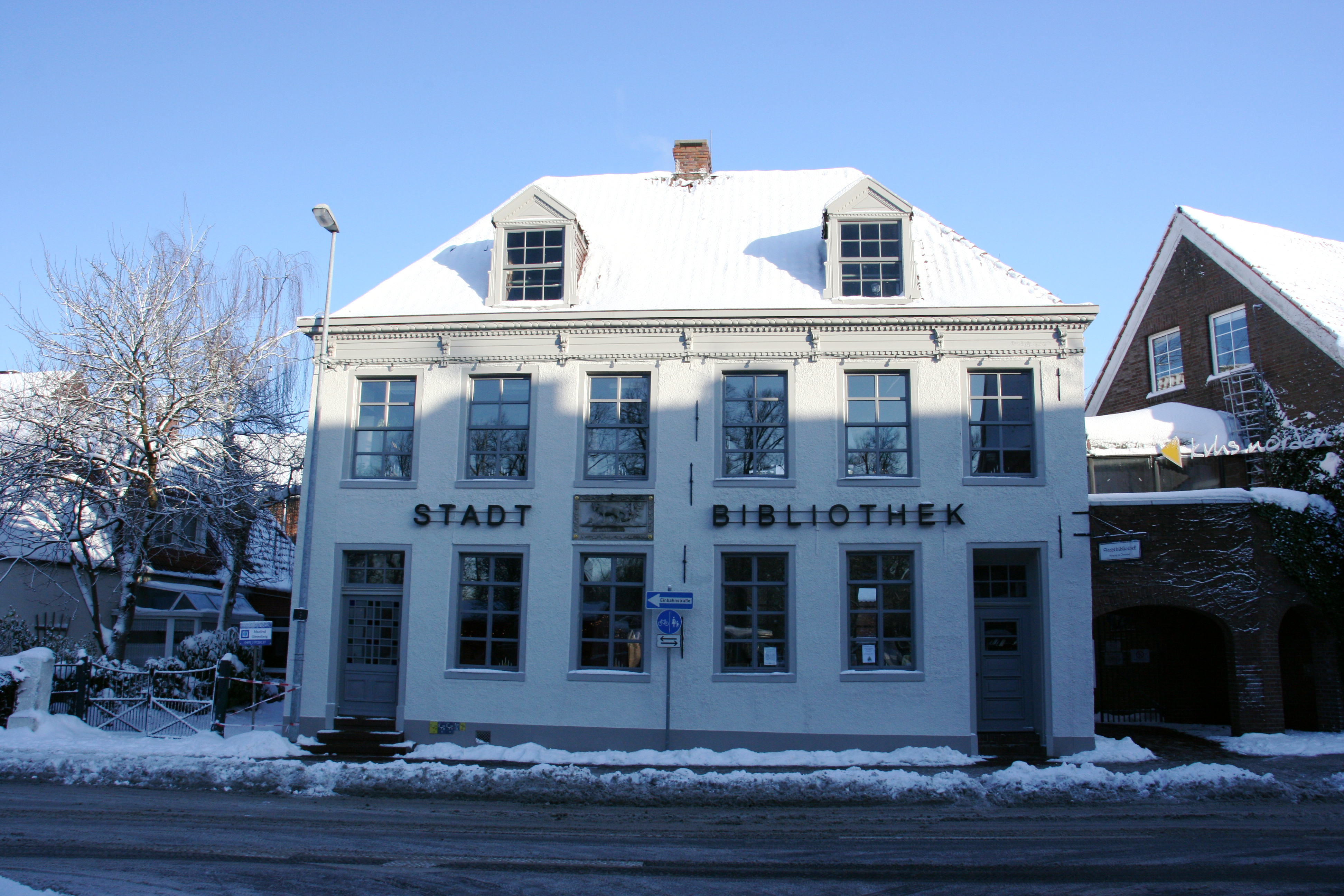 Stadtbücherei in Norden (Ostfriesland)